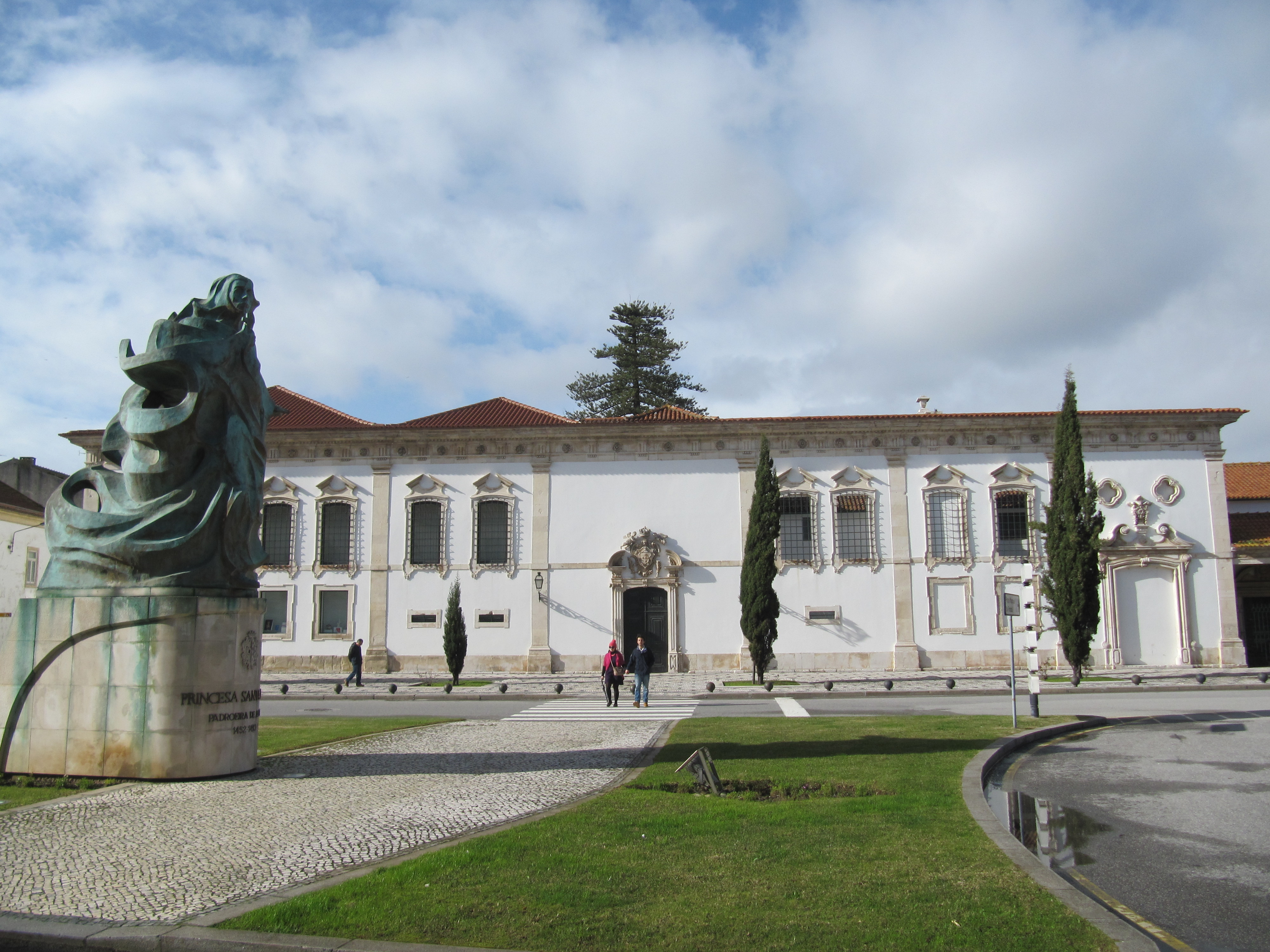 Museu De Aveiro